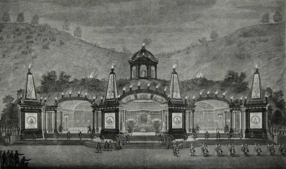 Dreiteiliger Saturnustempel. Vier Säulen mit den Namen und Bildnissen von Friedrich August, Maria Josepha, August und Christiane Eberhardine. Oben Saturn